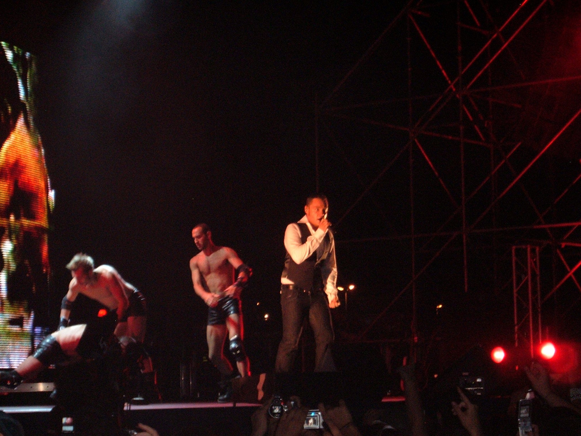 Tiziano Ferro canta davanti al suo pubblico